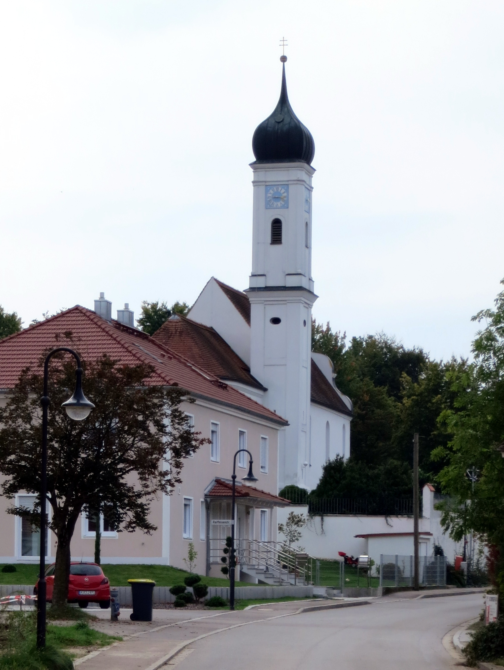 Die Kirche St. Bartholomäus in Wollomoos, Ansicht aus Ost